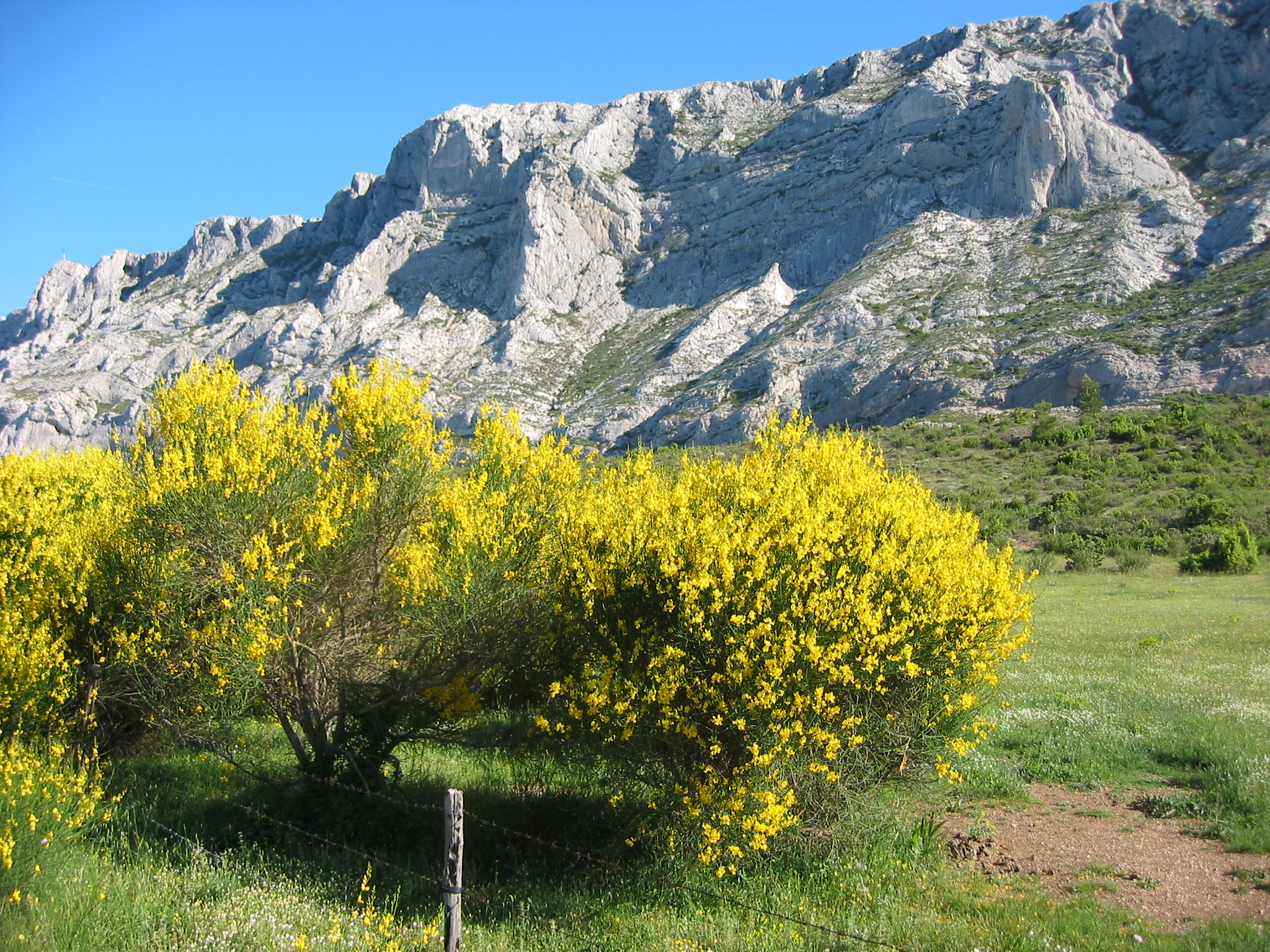 La Montagne Sainte-Victoire (France, Bouches-du-Rhône, 13), de près, côté sud. Photo prise le 31 mai 2002, depuis la route de Cézanne (D17) entre Le Tholonet et Beaurecueil Photographe : Ludovic Ruat utilisateur:civodule